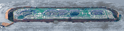 Festungsbau der Insel Langlütjen II